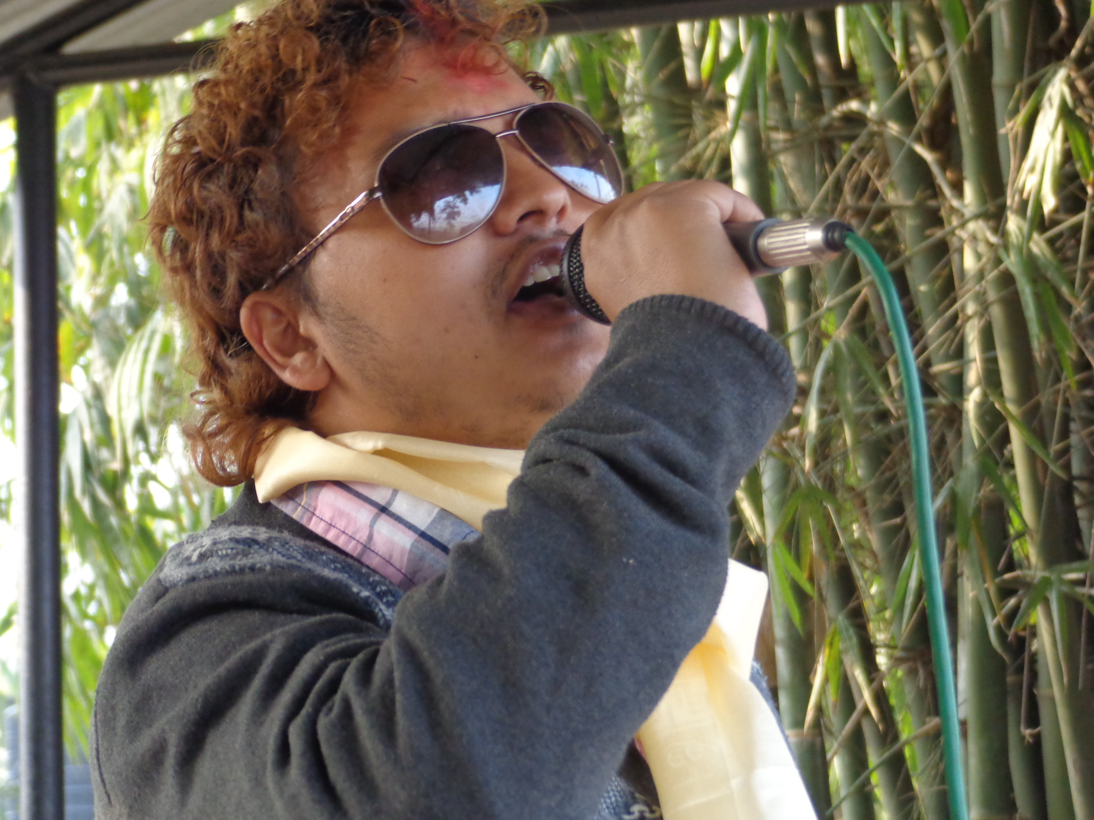 नेपाली: चितवनमा भएको एक कार्यक्रममा गीत प्रस्तुत गर्दै गायक प्रकाश तिमिल्सिना ।